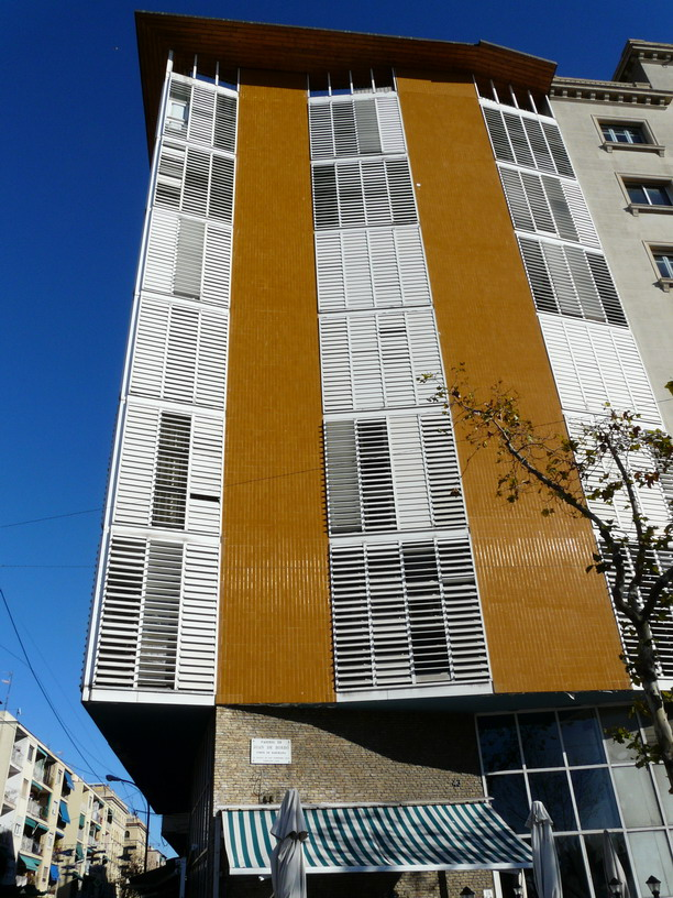 Casa de la Marina, passeig Joan de Borbó 43, Barcelona. Obra dels arquitectes Josep Antoni Coderch i Manel Valls, 1952-1954.